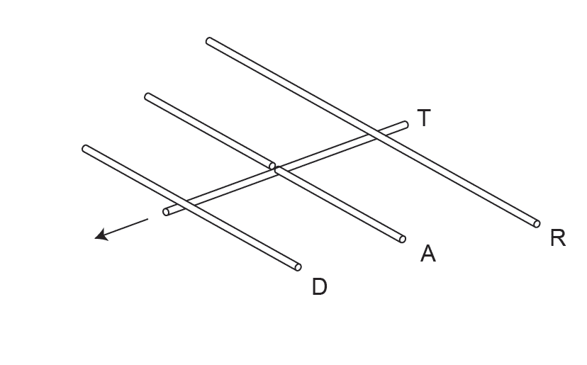 Uda yagi antenna, schematics (Антенна «волновой канал», схема)